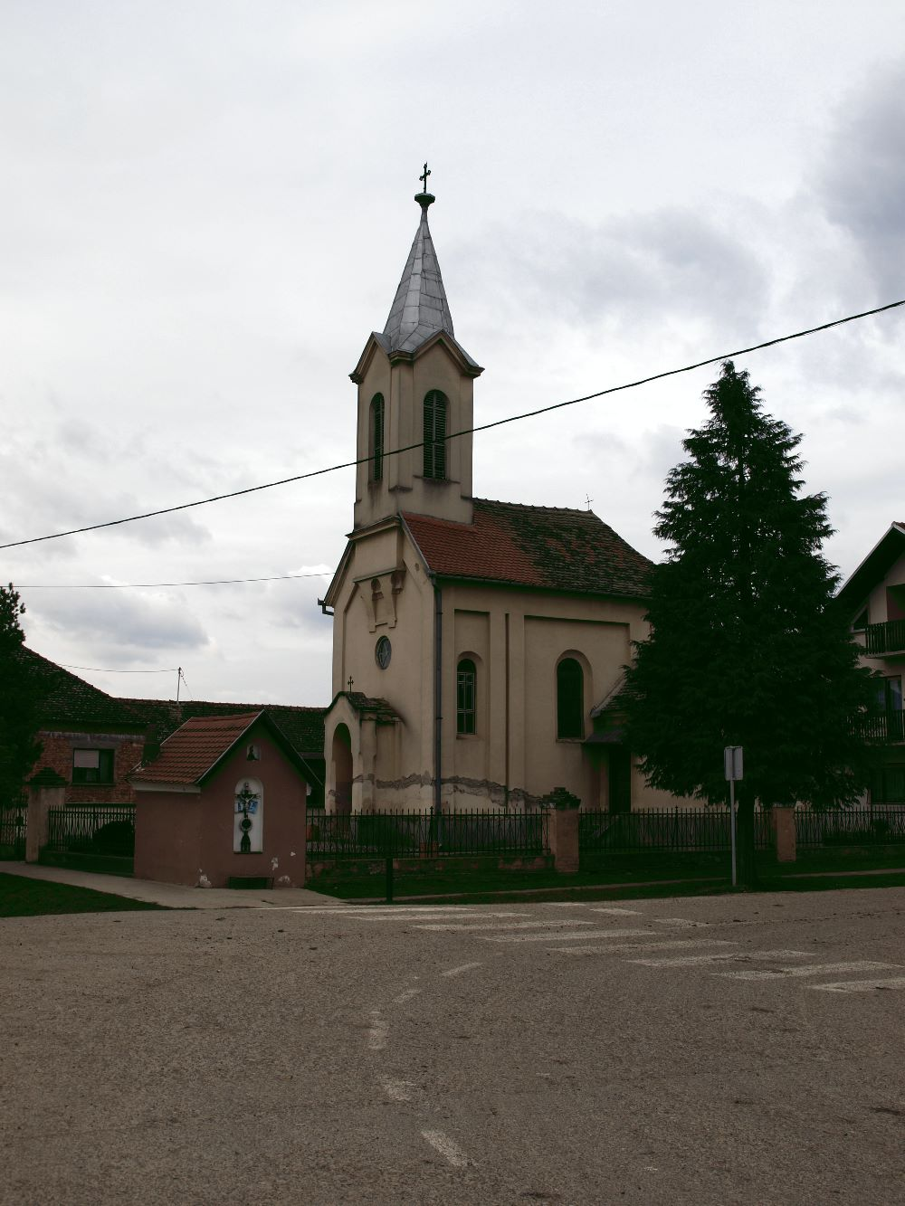 Crkva u Banovcima, Brodsko-posavska županija.